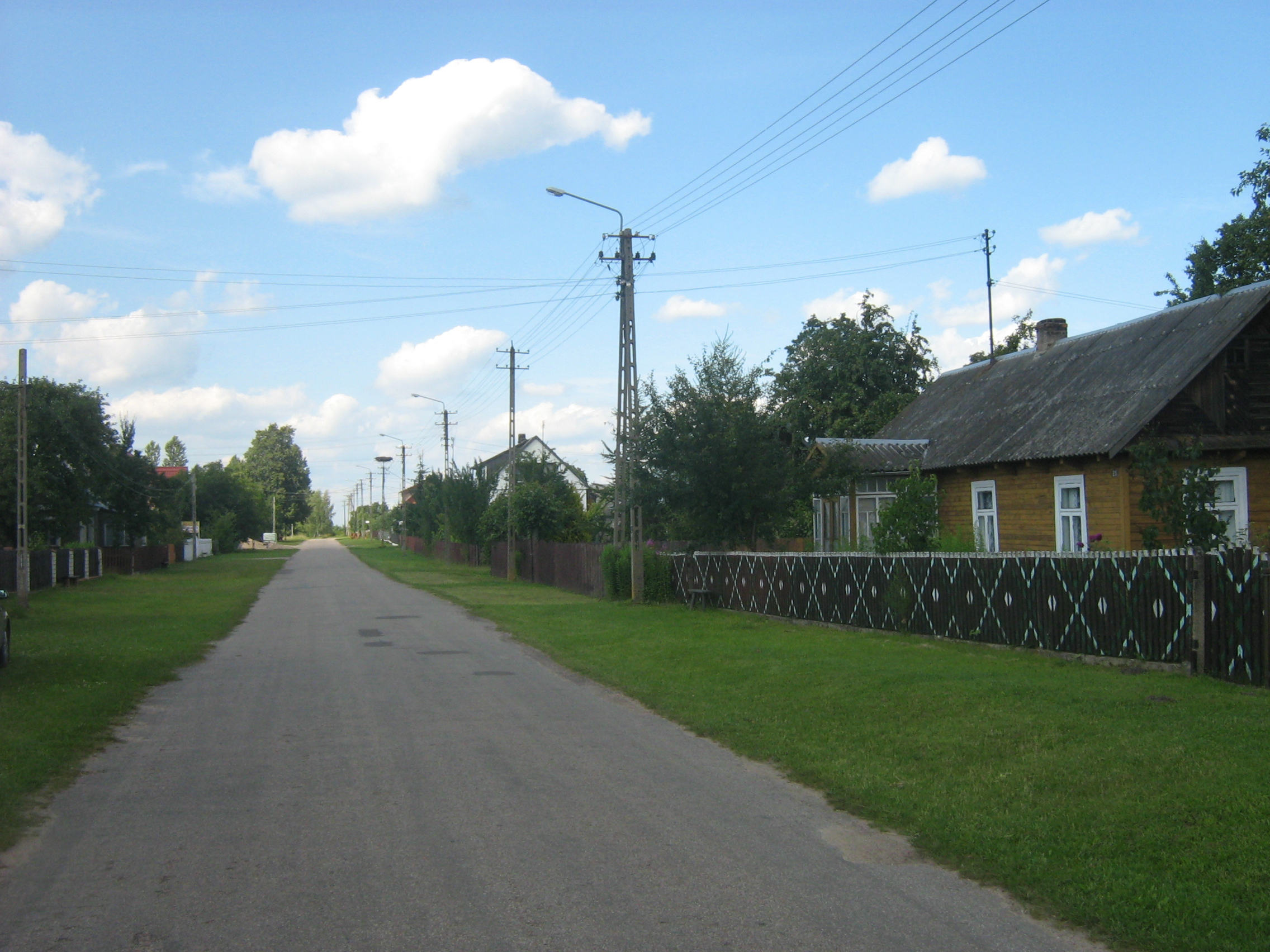 Wasilkowo